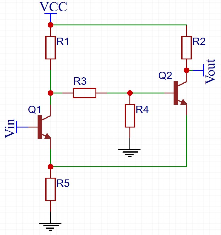 Ebasümmeetriline mitteinverteeriv Schmitt trigger